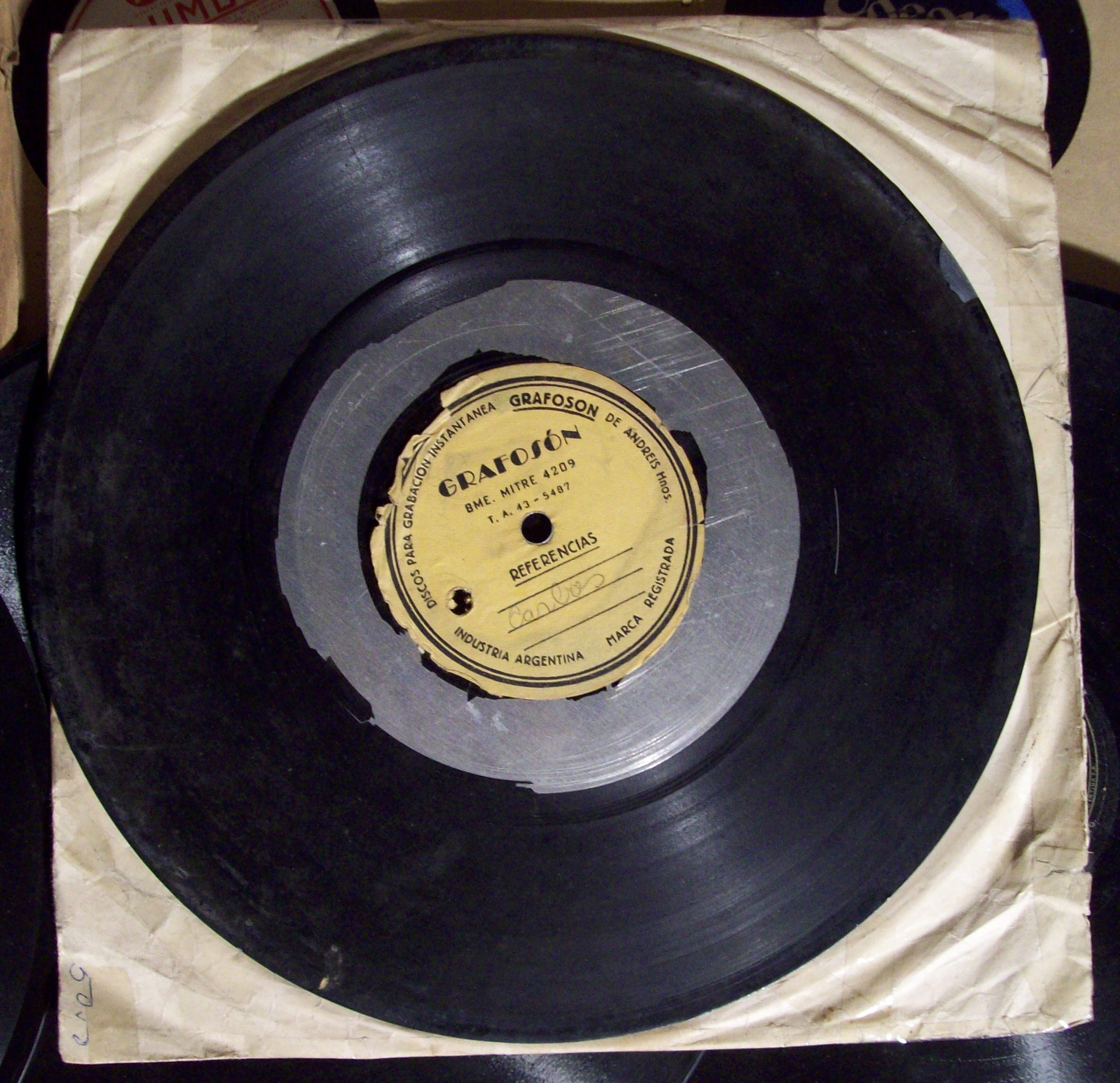 Disco de acetato grabado caseramente. Se puede ver al rededor de la etiqueta que parte del recubrimiento de acetato se resquebrajo, se puede ver el disco de aluminio.